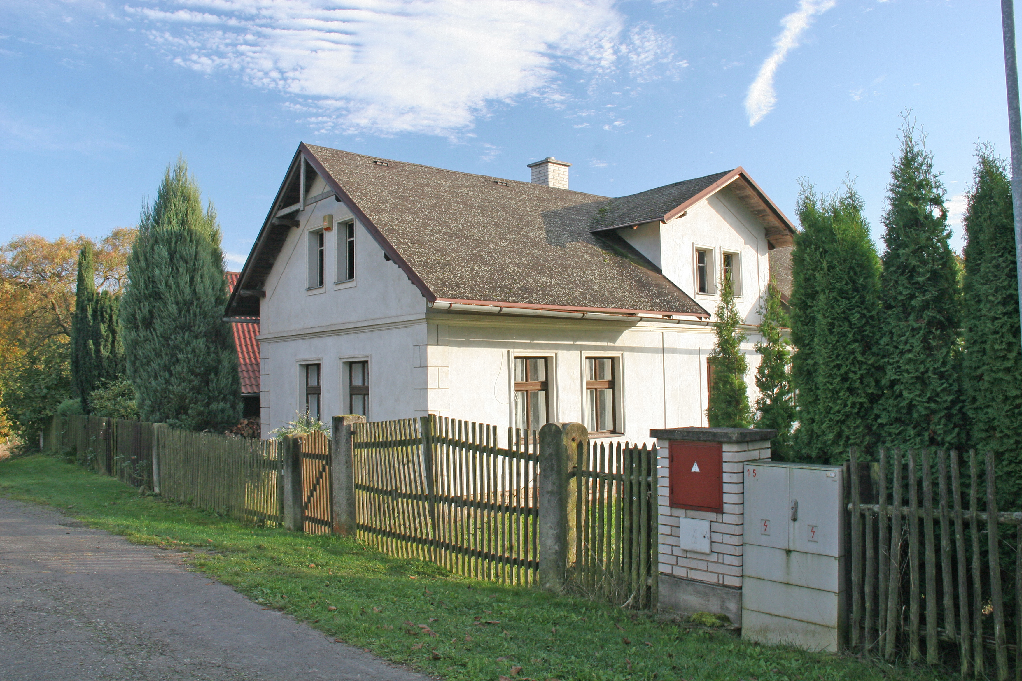 Netolice 9